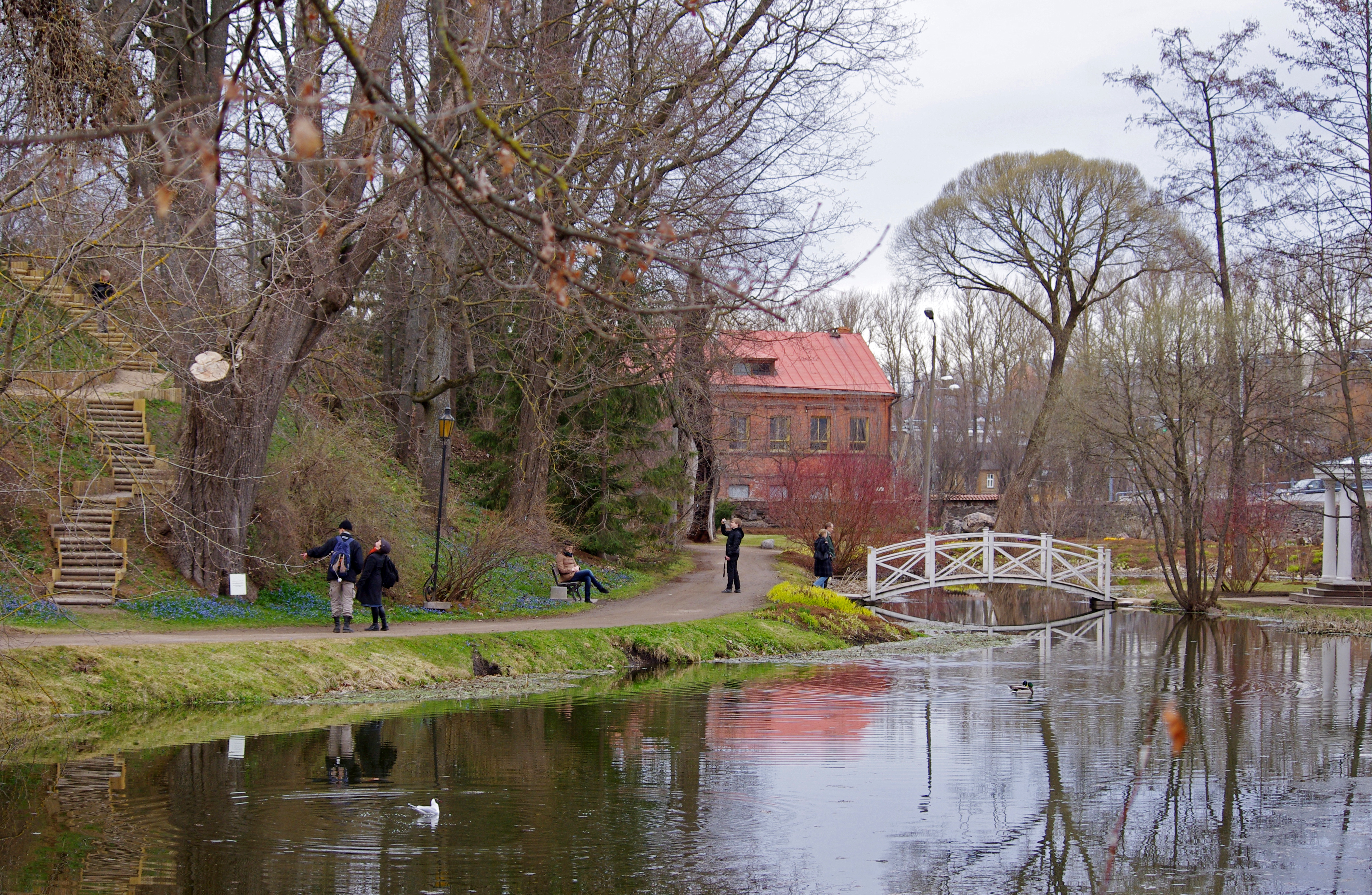 Tartu botaanikaaed 20. aprillil 2011